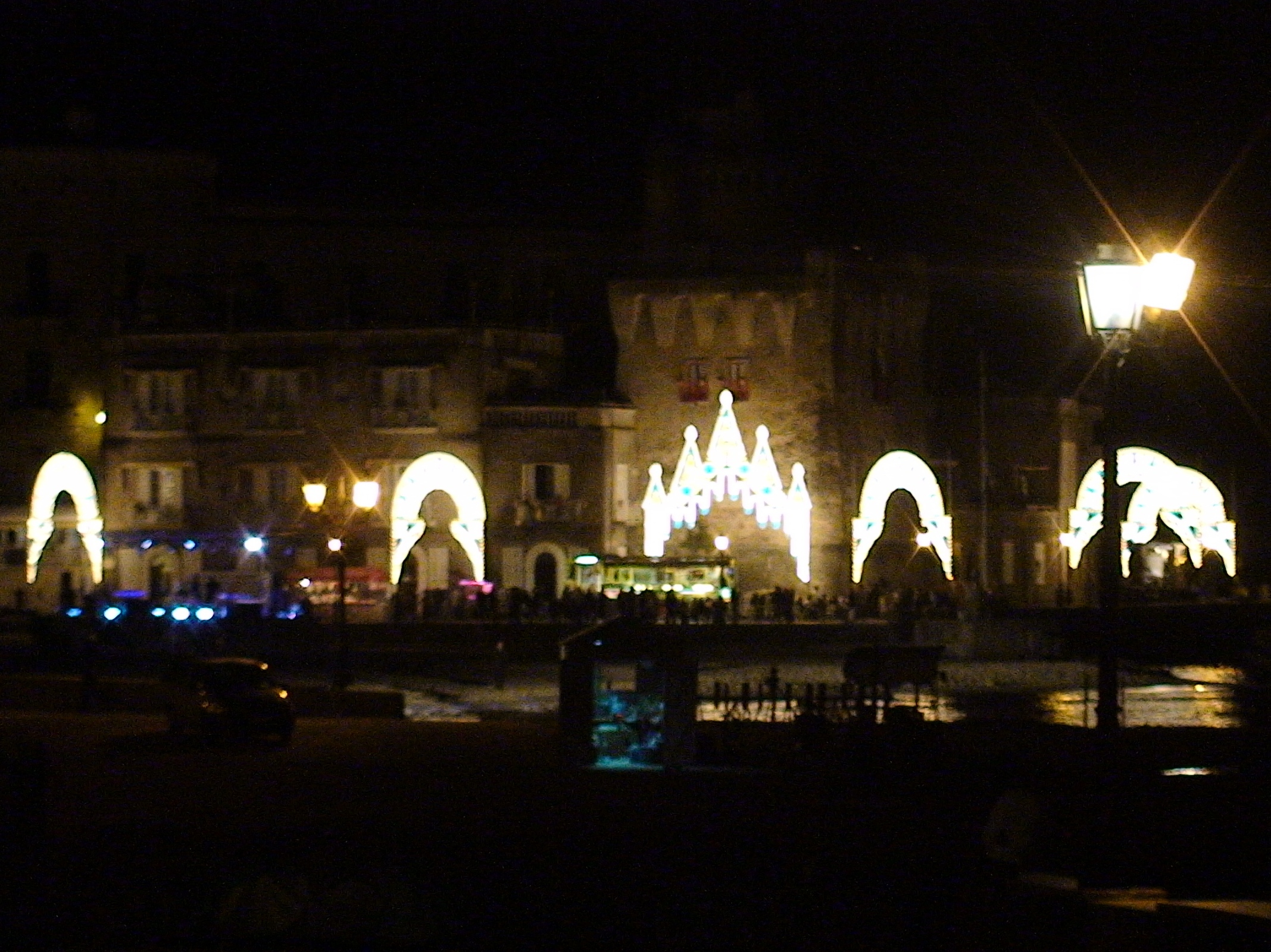 Il set di benvenuti al sud a marina piccola di s.maria di castellabate (salerno). Scena della festa di paese.